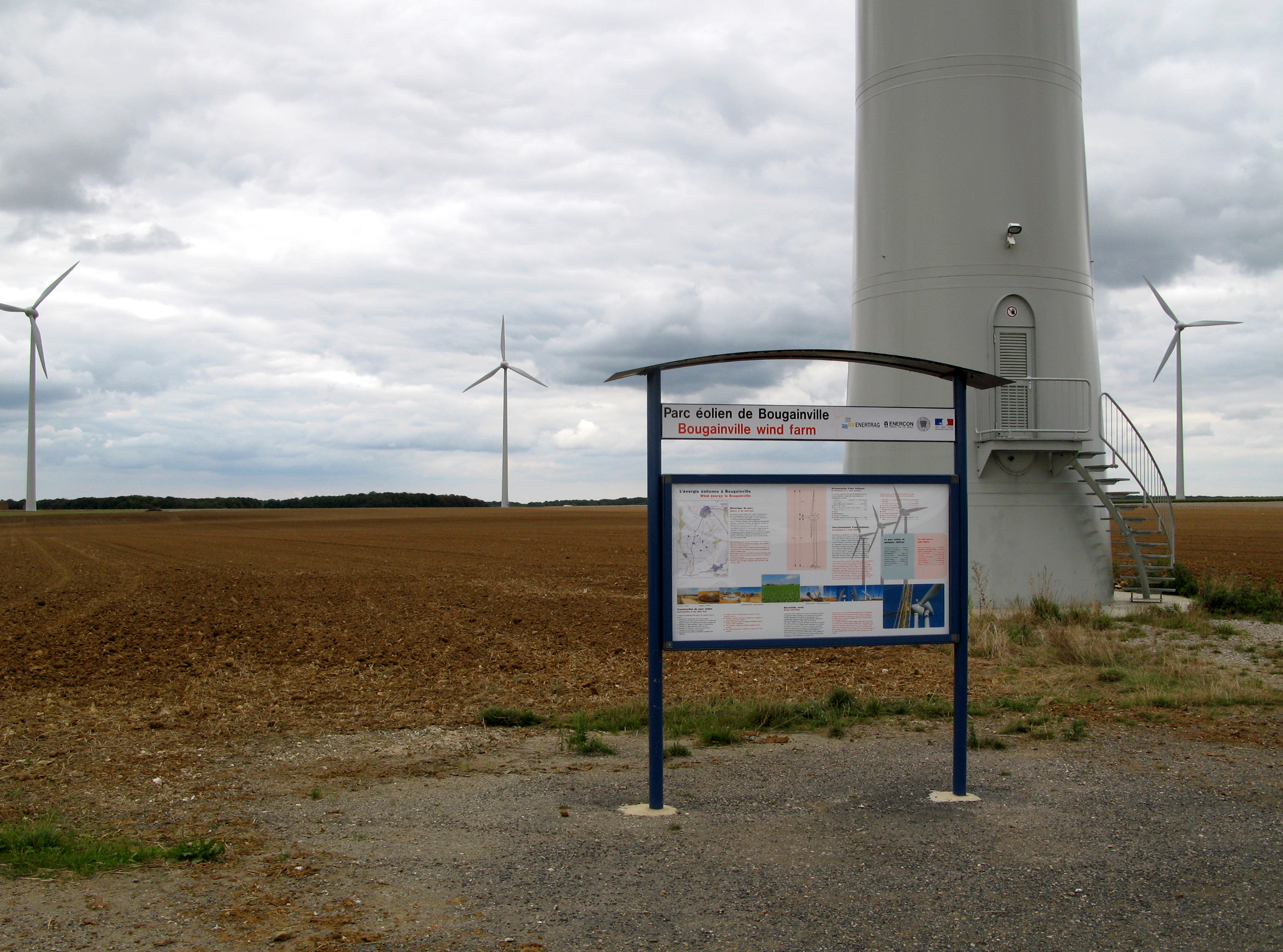 Bougainville (Somme, France) - Les éoliennes. .